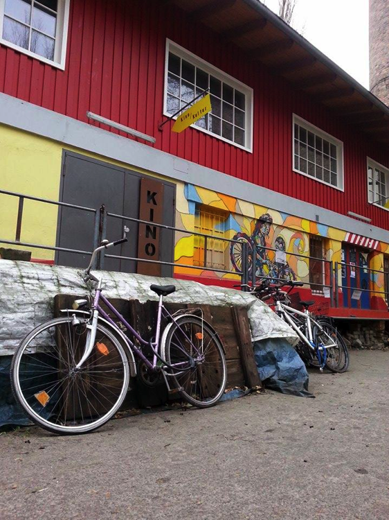 Regenbogenfabrik (Kinoetage oben) - 1981 besetztes und heute legales Alternativprojekt in Berlin-Kreuzberg, Germany.